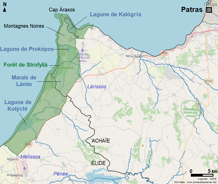 Emprise du parc national de Kotýchi-Strofyliá en vert et principaux éléments naturels le composant. Sont également légendés les districts régionaux de la région et l'agglomération de Patras. UNEP-WCMC and IUCN (2020), Protected Planet: Ethniko Parko Ygrotopon Kotychiou - Strofylias in Greece ; The World Database on Protected Areas (WDPA)/The Global Database on Protected Areas Management Effectiveness (GD-PAME) [On-line], Cambridge, UK. Data provided by the European Environment Agency (EEA). Available at: Basemap: OpenStreetMap. Free software: QGIS. Creation: Iolchos07.